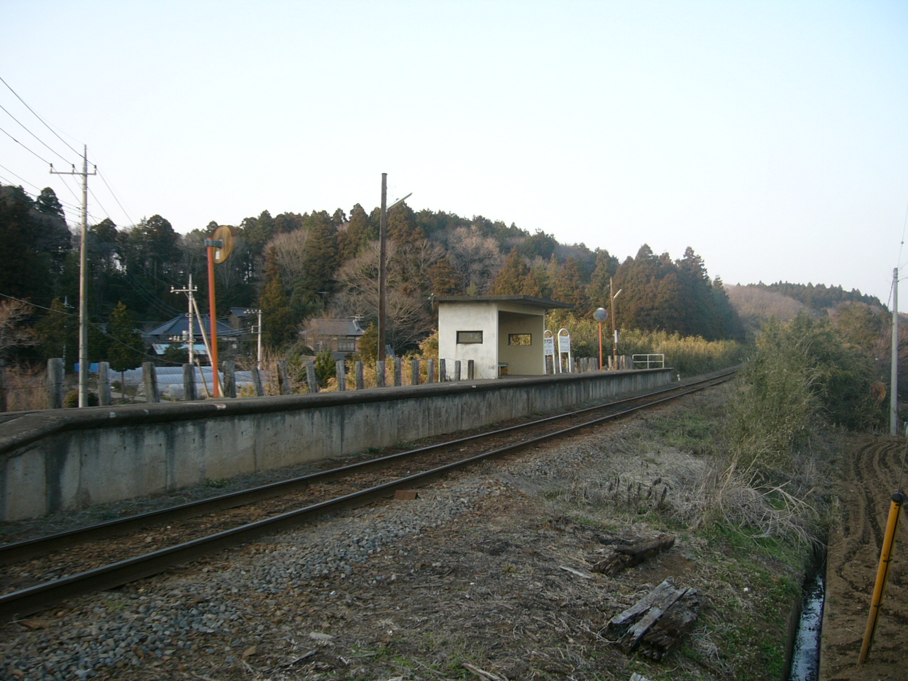 Kariyadomae Station